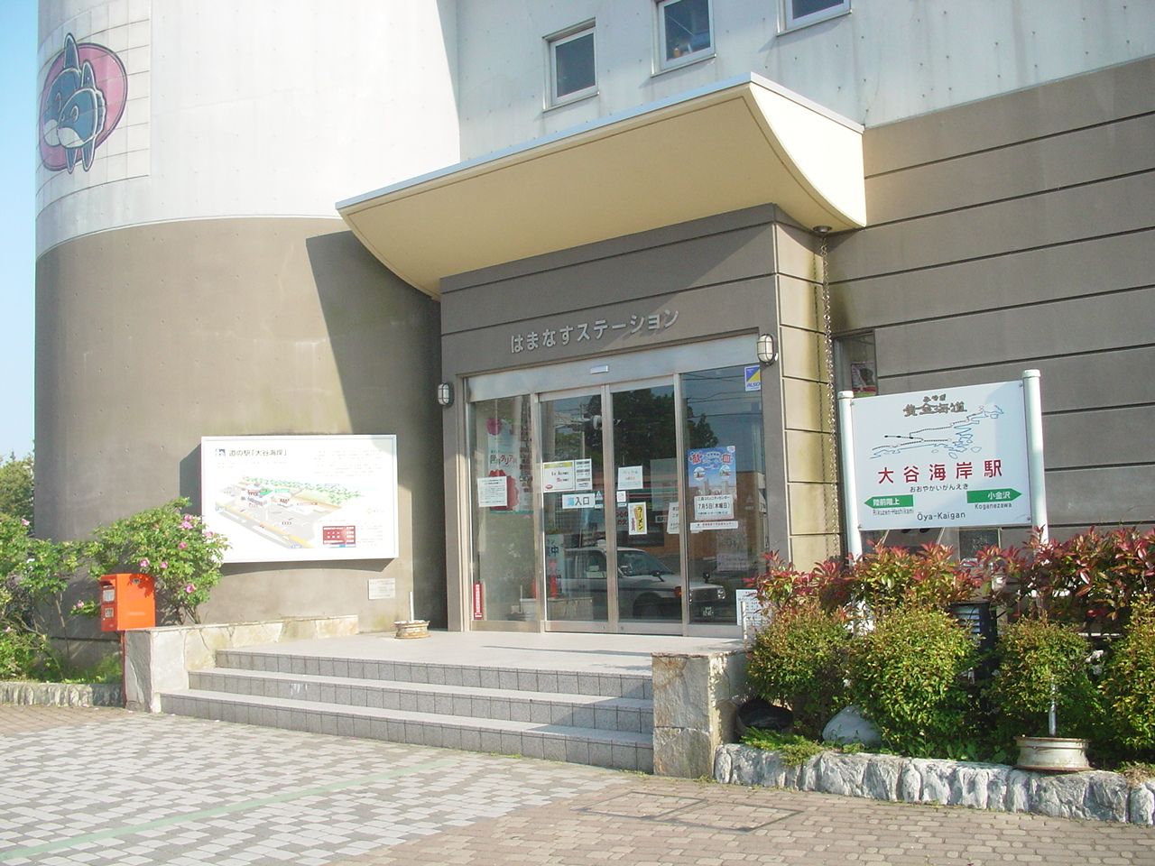 （駅入り口）